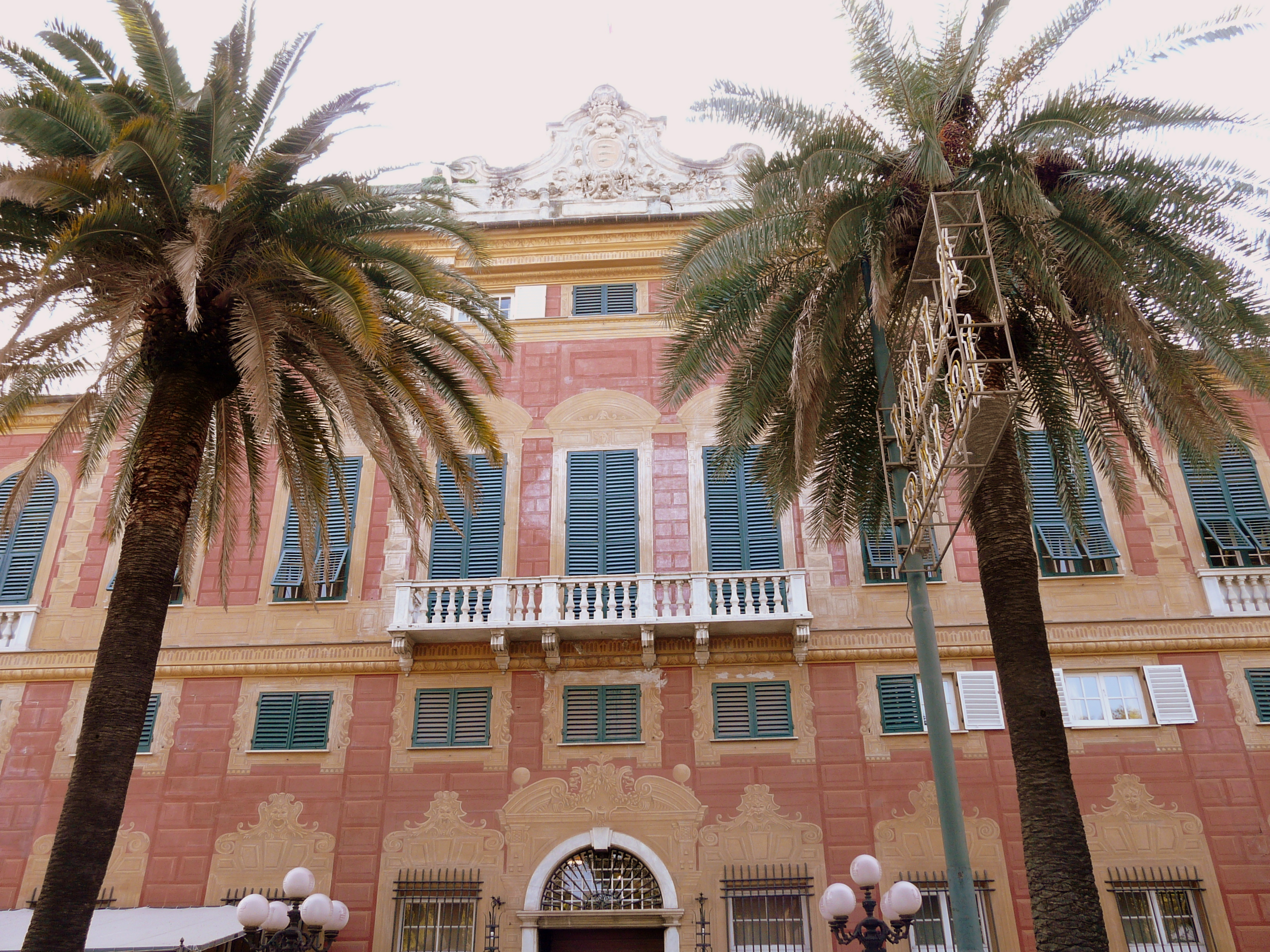 Palazzo Balbi-Brignole, Sestri Levante, Liguria, Italia